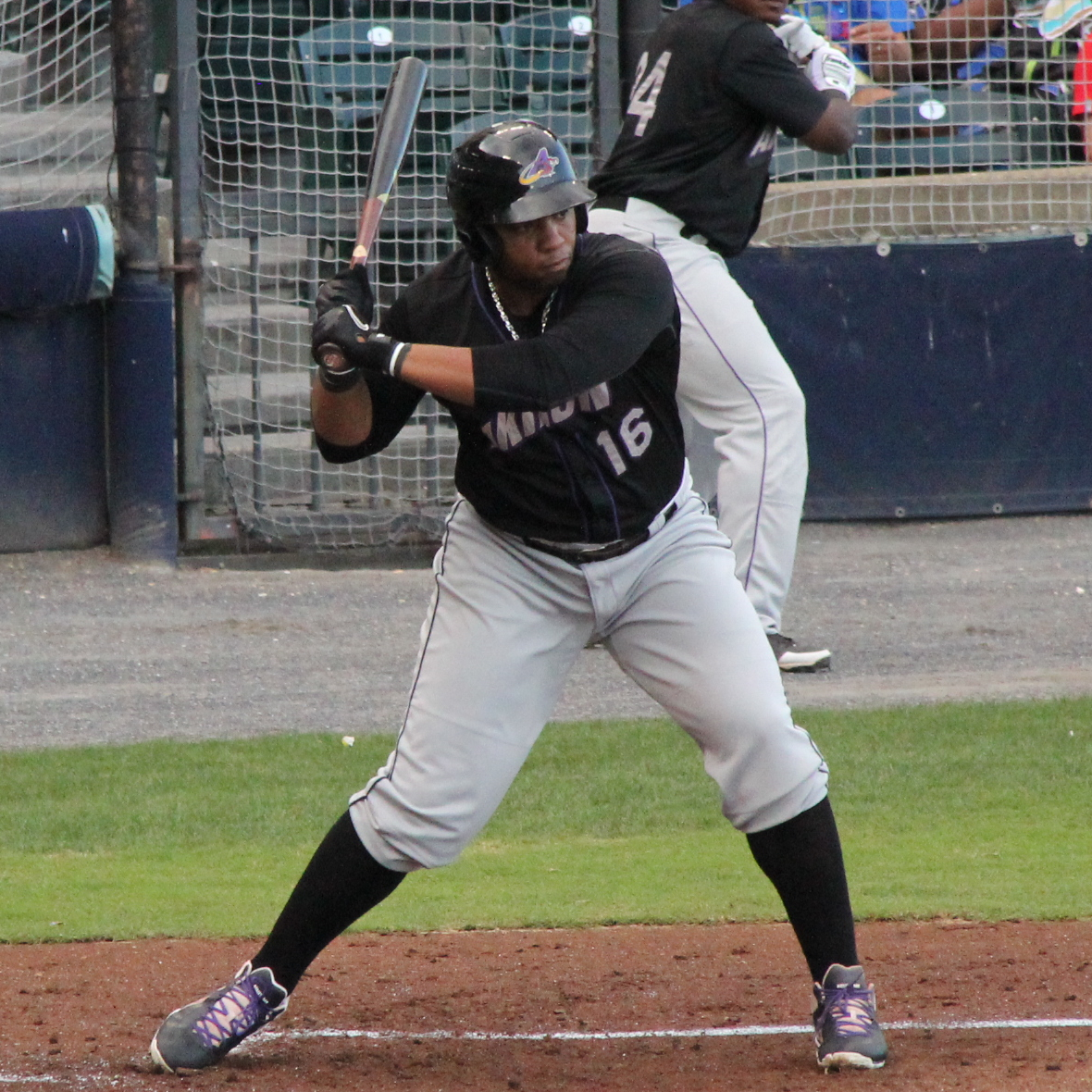 Jesús Aguilar